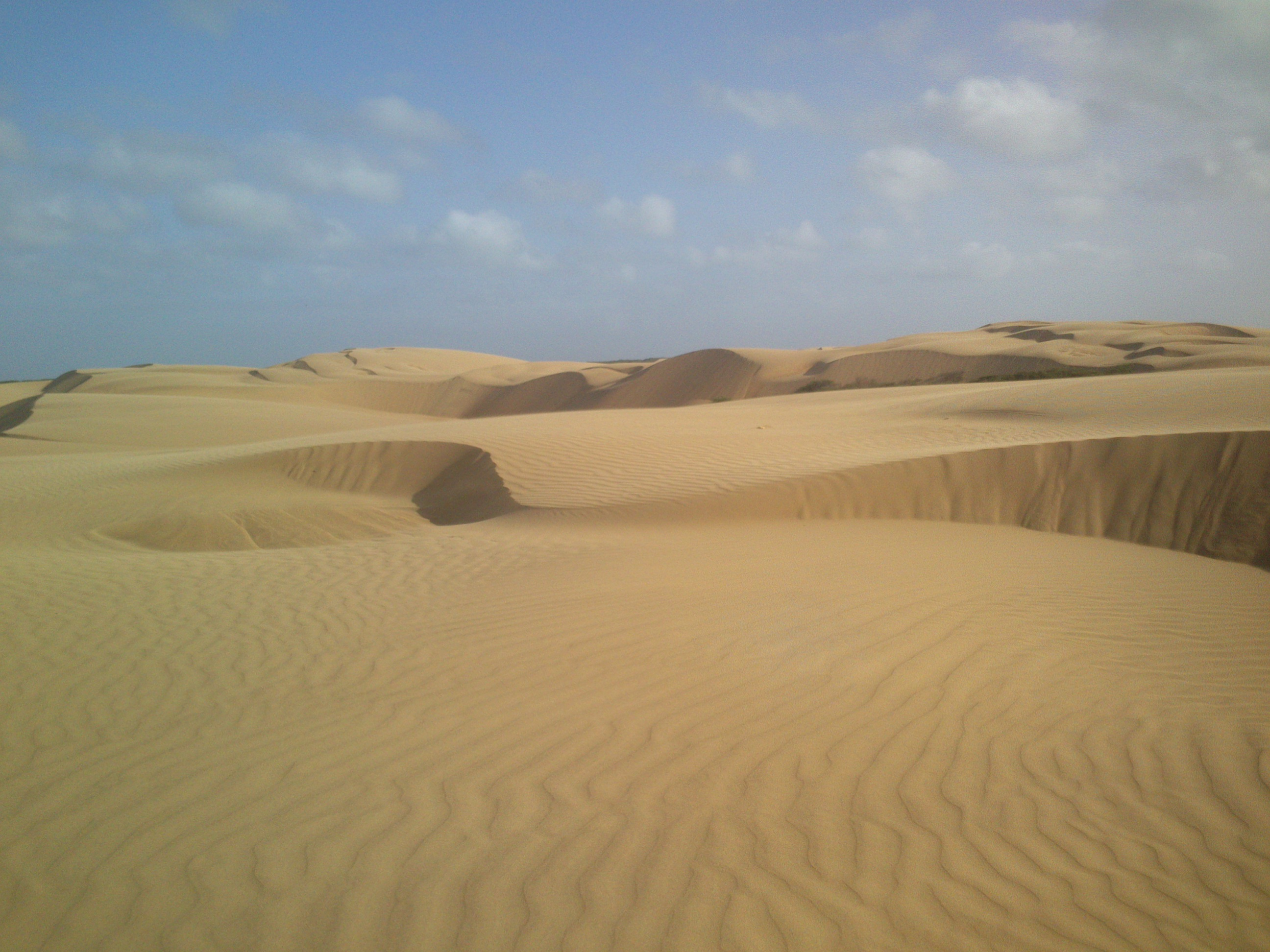 Aquí nos damos cuenta de lo pequeños que somos